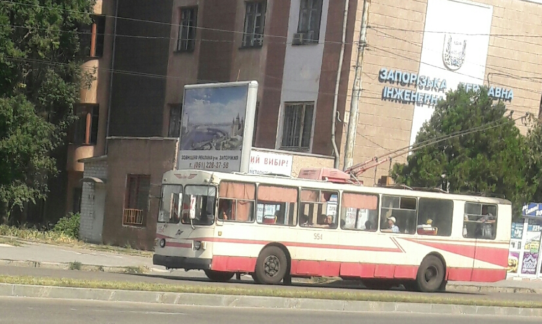 Запоріжжя, проспект Соборний. Тролейбус ЗіУ-682В на маршруті № 14.